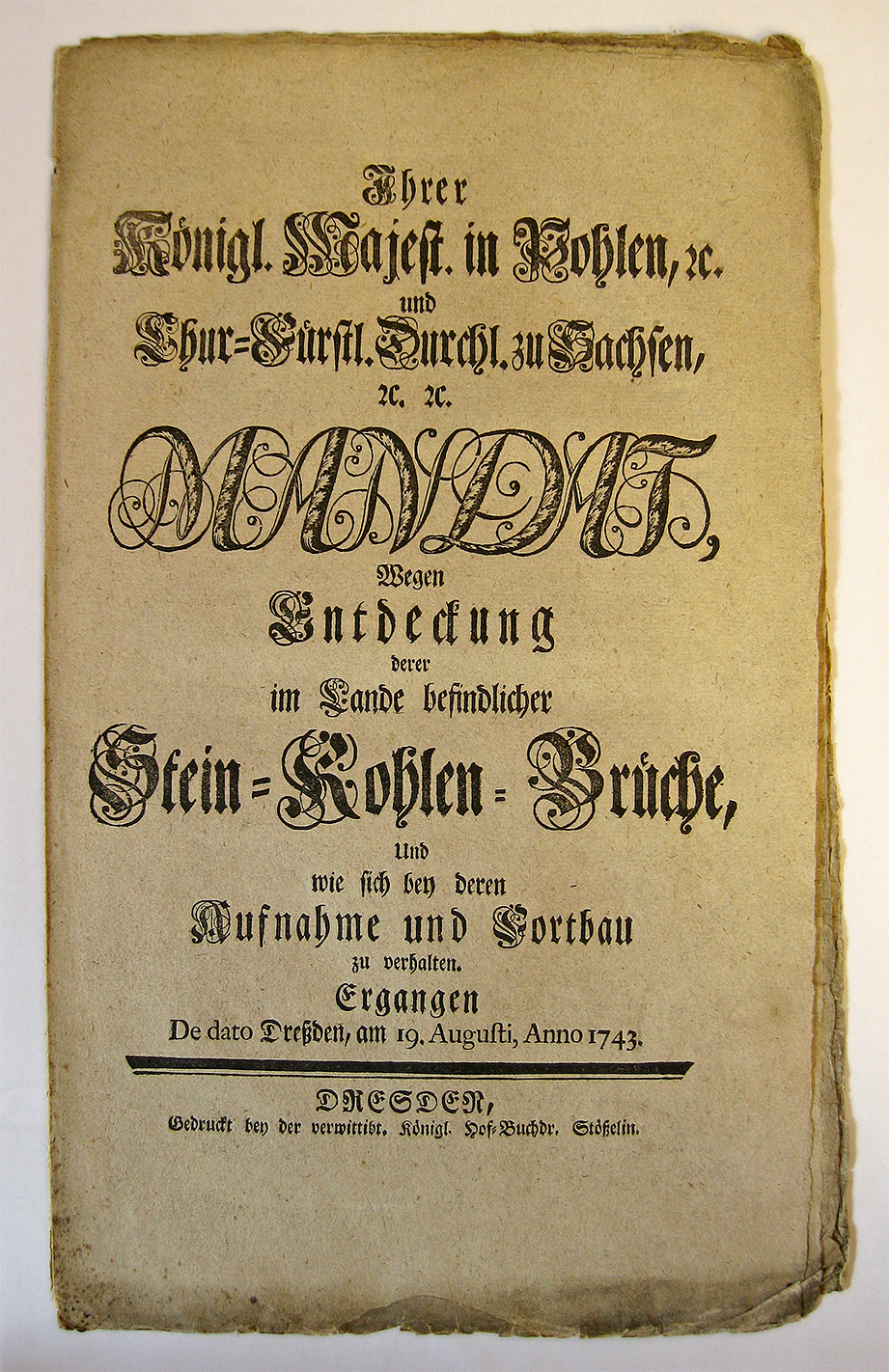 Steinkohlenmandat Dresden 1743